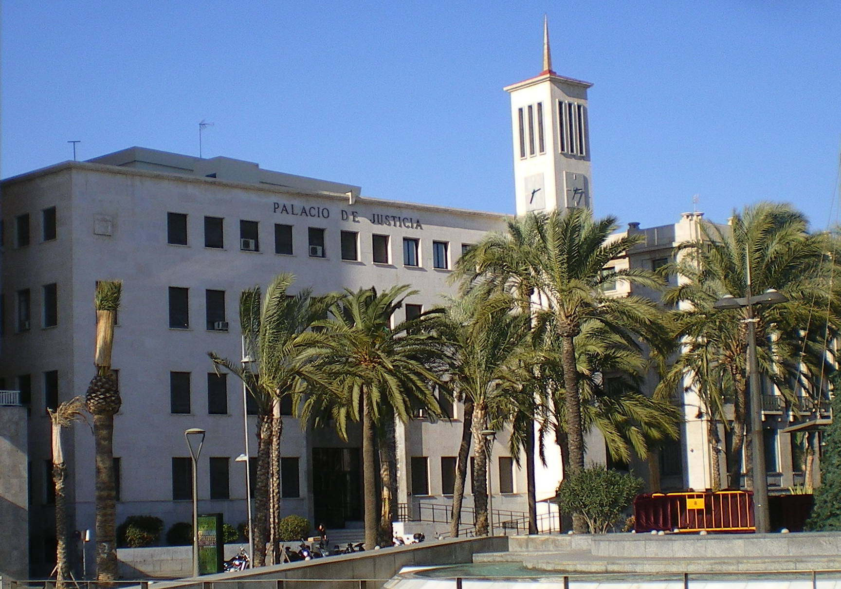 Fotografía del antiguo Palacio de Justicia de Almería, Andalucía, España, desde el sureste.